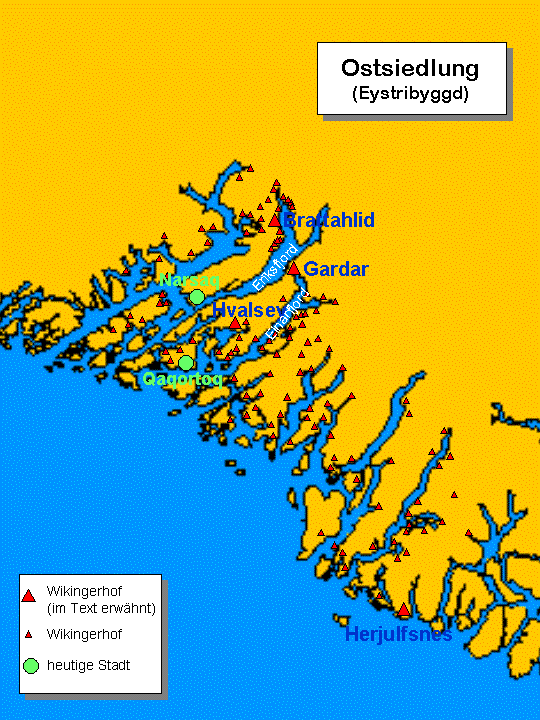 Karte der wikingischen Ostsiedlung auf Grönland